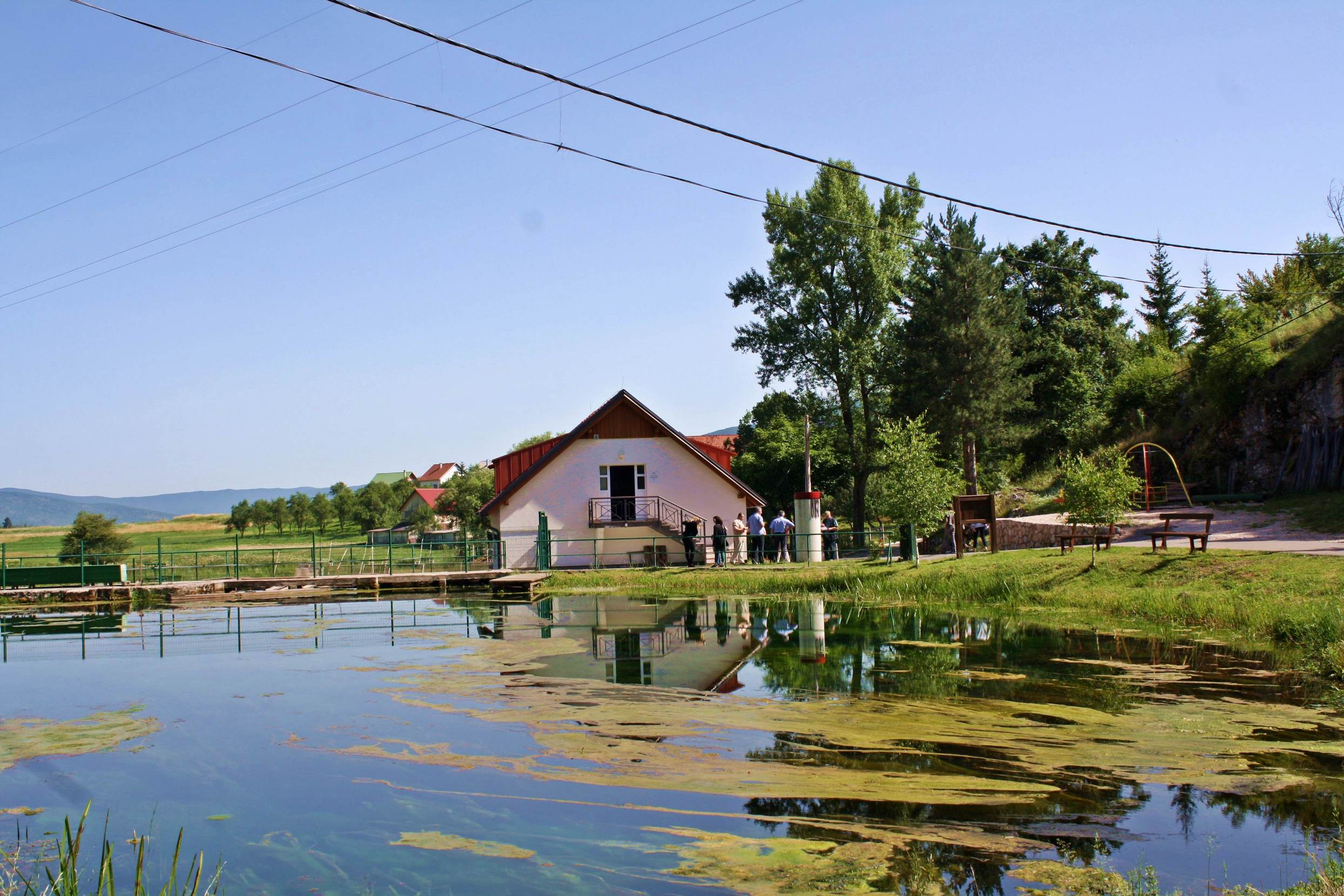 Hrvatski centar za autohtone vrste riba i rakova krških voda Kostelka Ličko Lešće